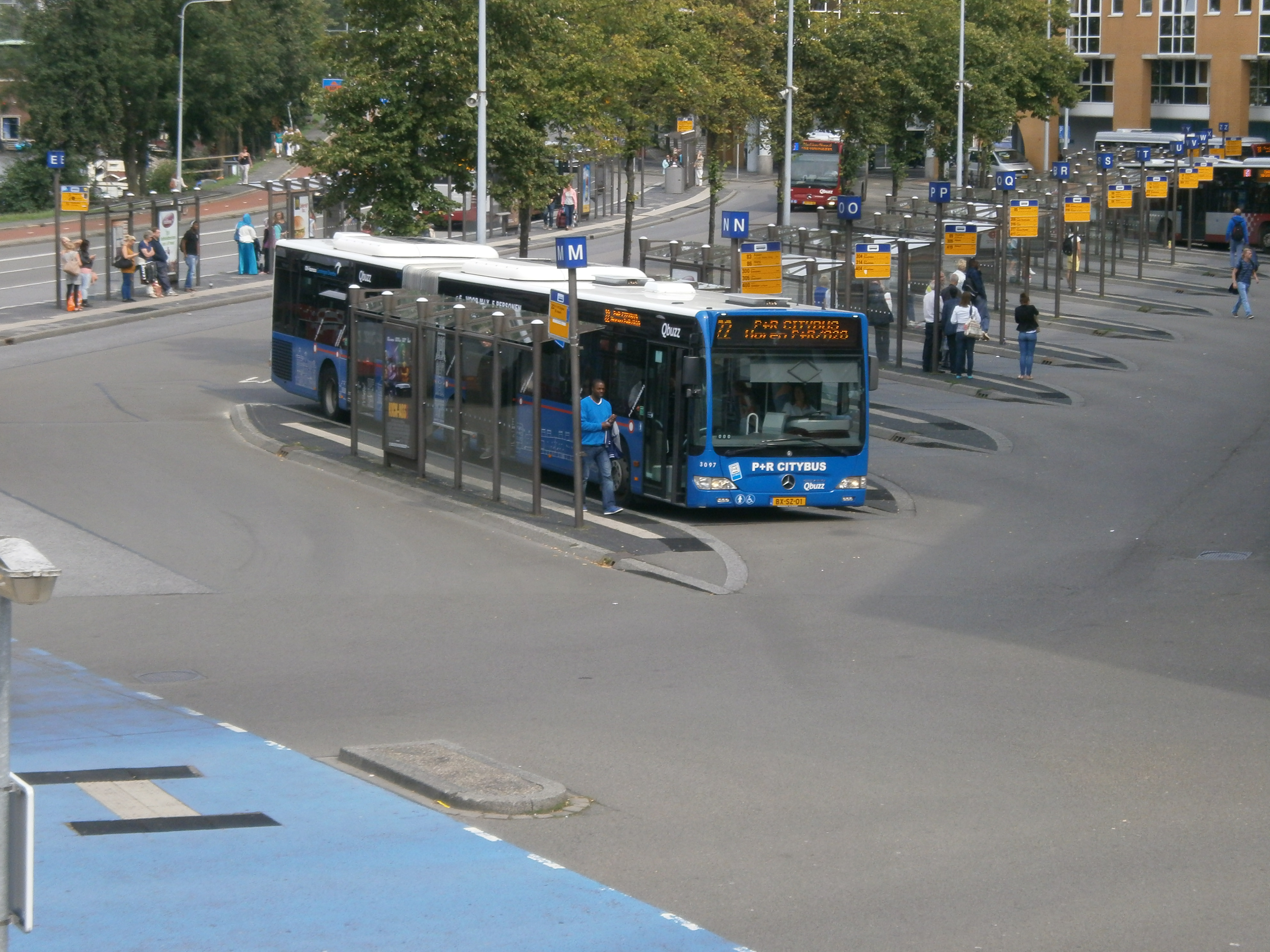 Lijn 22 op het busstation bij het hoofdstation van Groningen